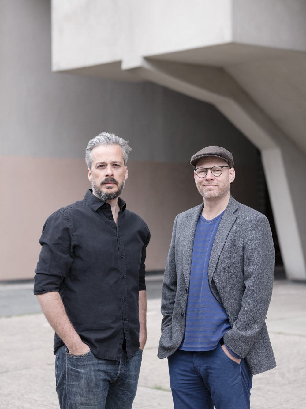 Fritz Brunier (l.) und David Hiepler